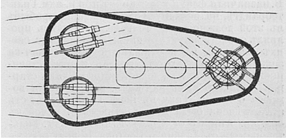 Данное изображение было использовано в статье «Бруствер башенный» опубликованной в пятом томе «Военной энциклопедии», который был издан книгоиздательским товариществом Ивана Дмитриевича Сытина в 1911 году в столице Российской империи городе Санкт-Петербурге.